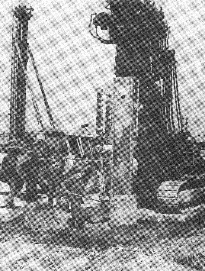 Oficjalne rozpoczęcie budowy I linii metra w Warszawie od wbicia w ziemię pierwszego stalowego pala tunelu szlakowego B5. Ursynów-Natolin, 15 kwietnia 1983.